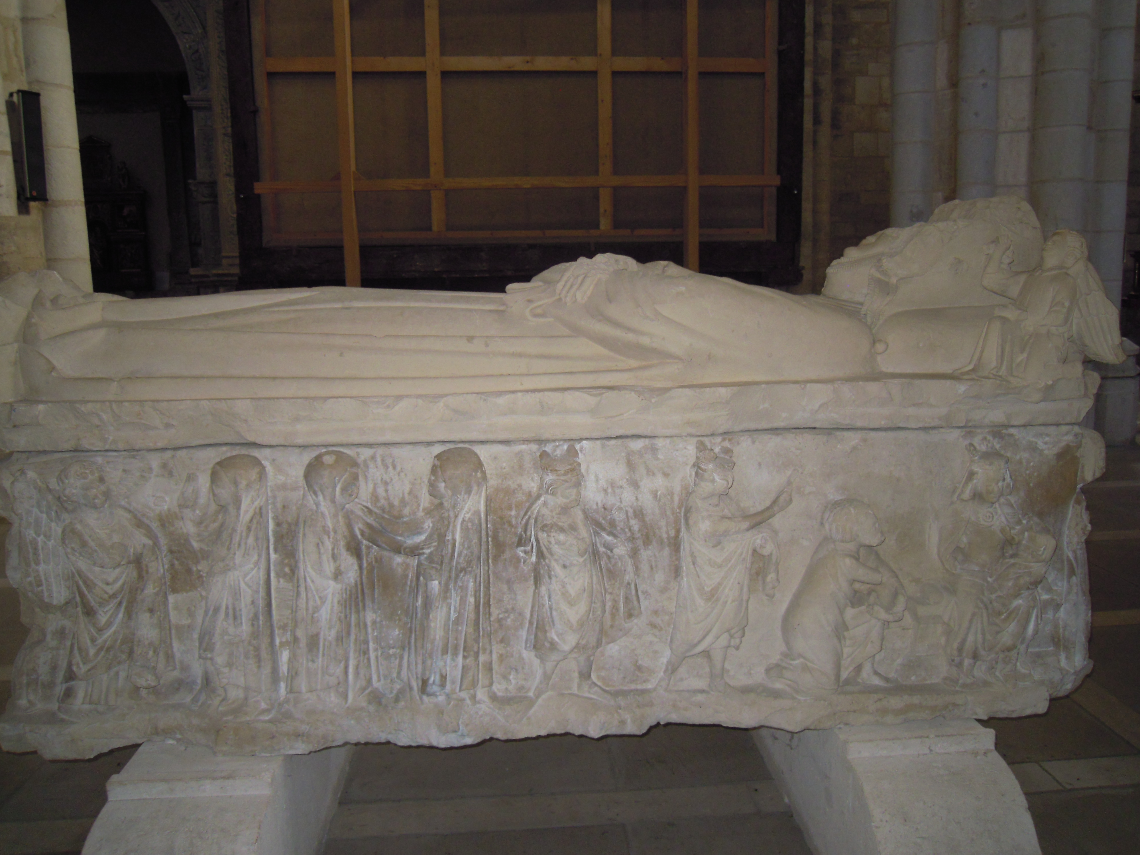 Urraca López de Haro sepulcro en el Museo del Retablo Burgos_originalmente en Monasterio de Vileña